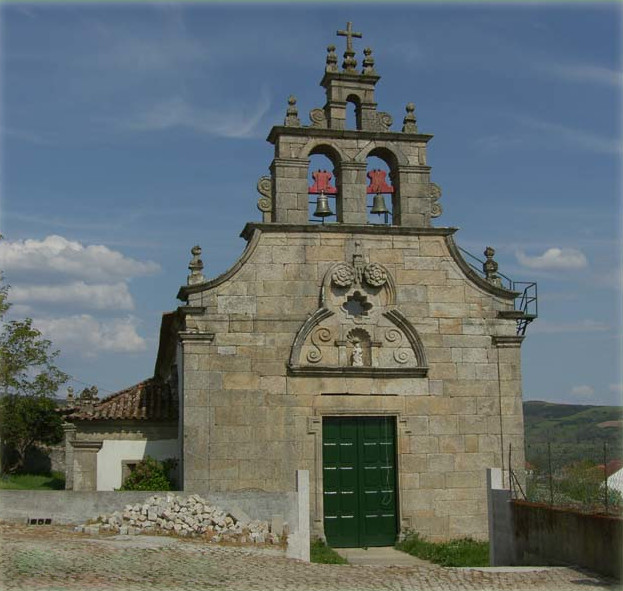 igreja.